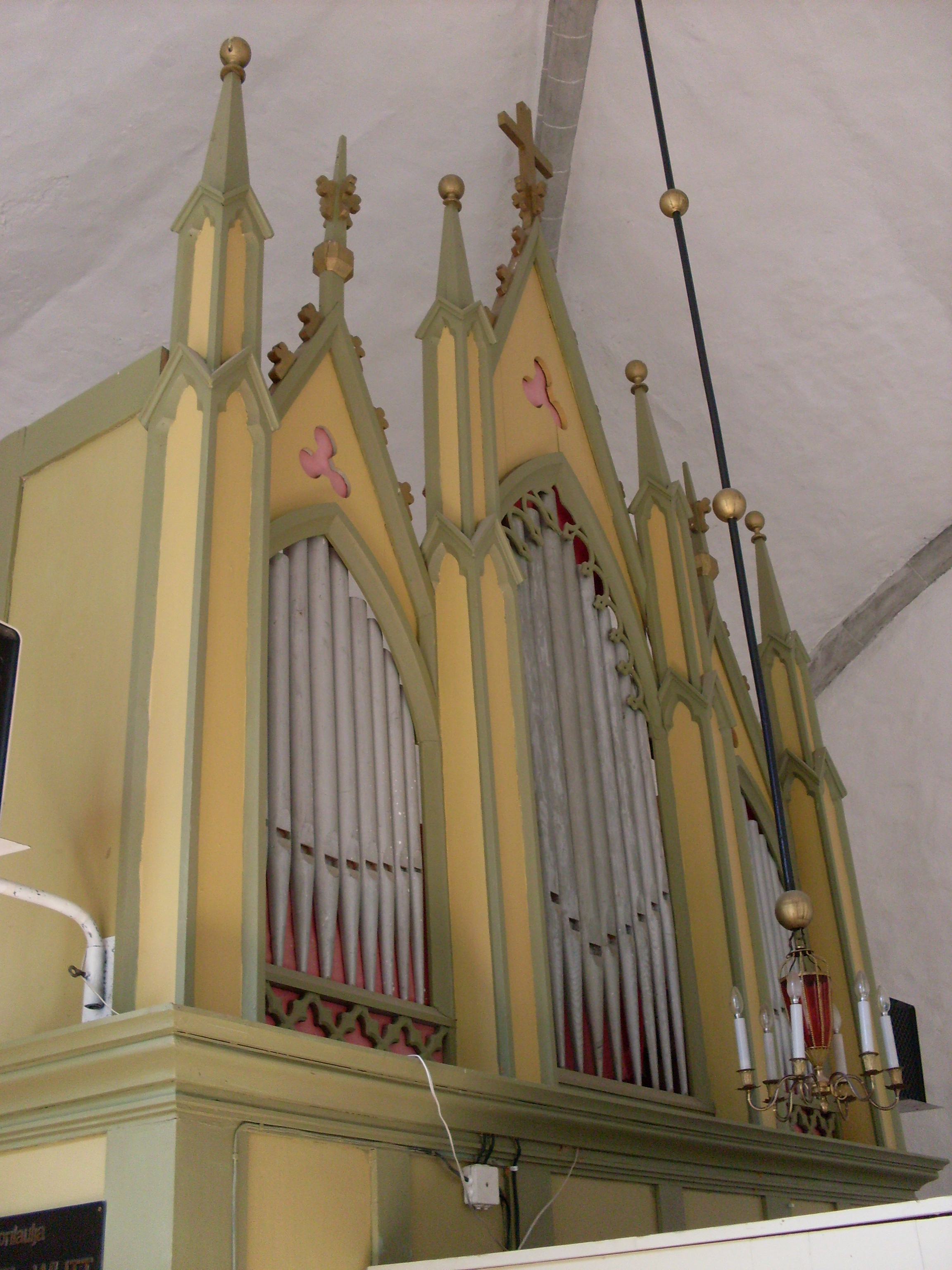 Märjamaa kiriku orel